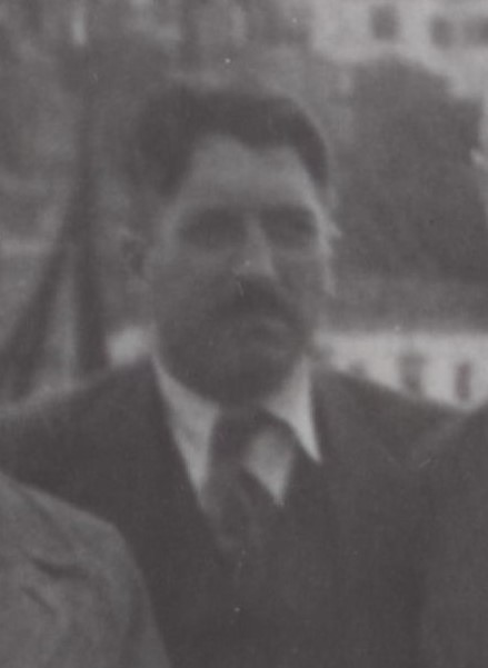 Писателят Орлин Василев на литературно четене в Кавала